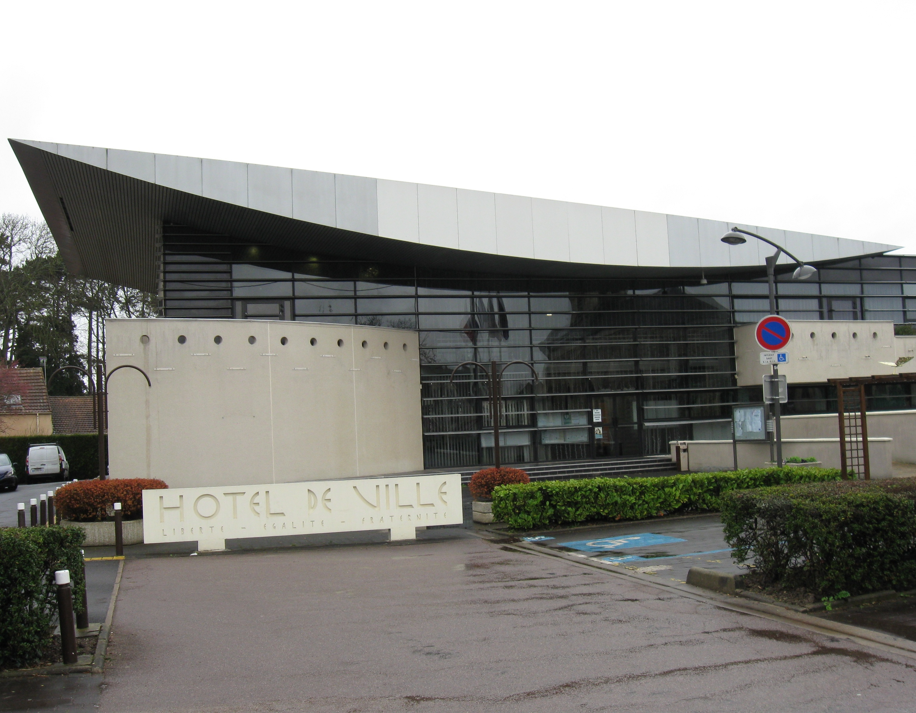 Mairie d'Émerainville. (Seine-et-Marne, région Île-de-France).